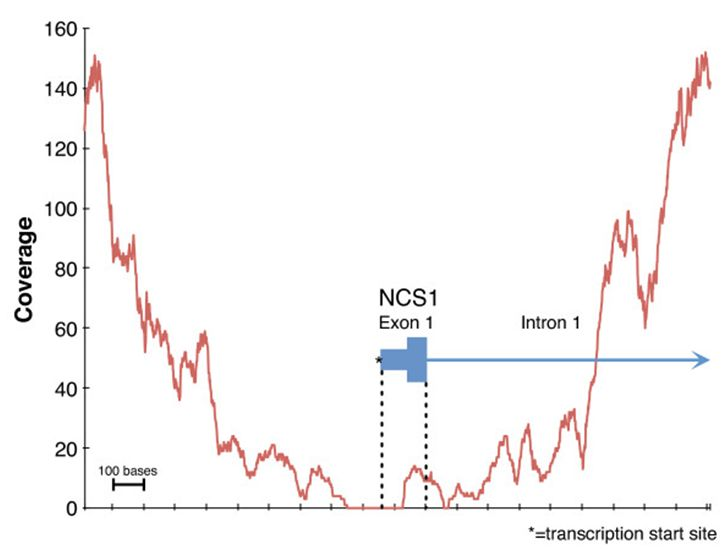 Žmogaus NCS1 geno sekoskaita.